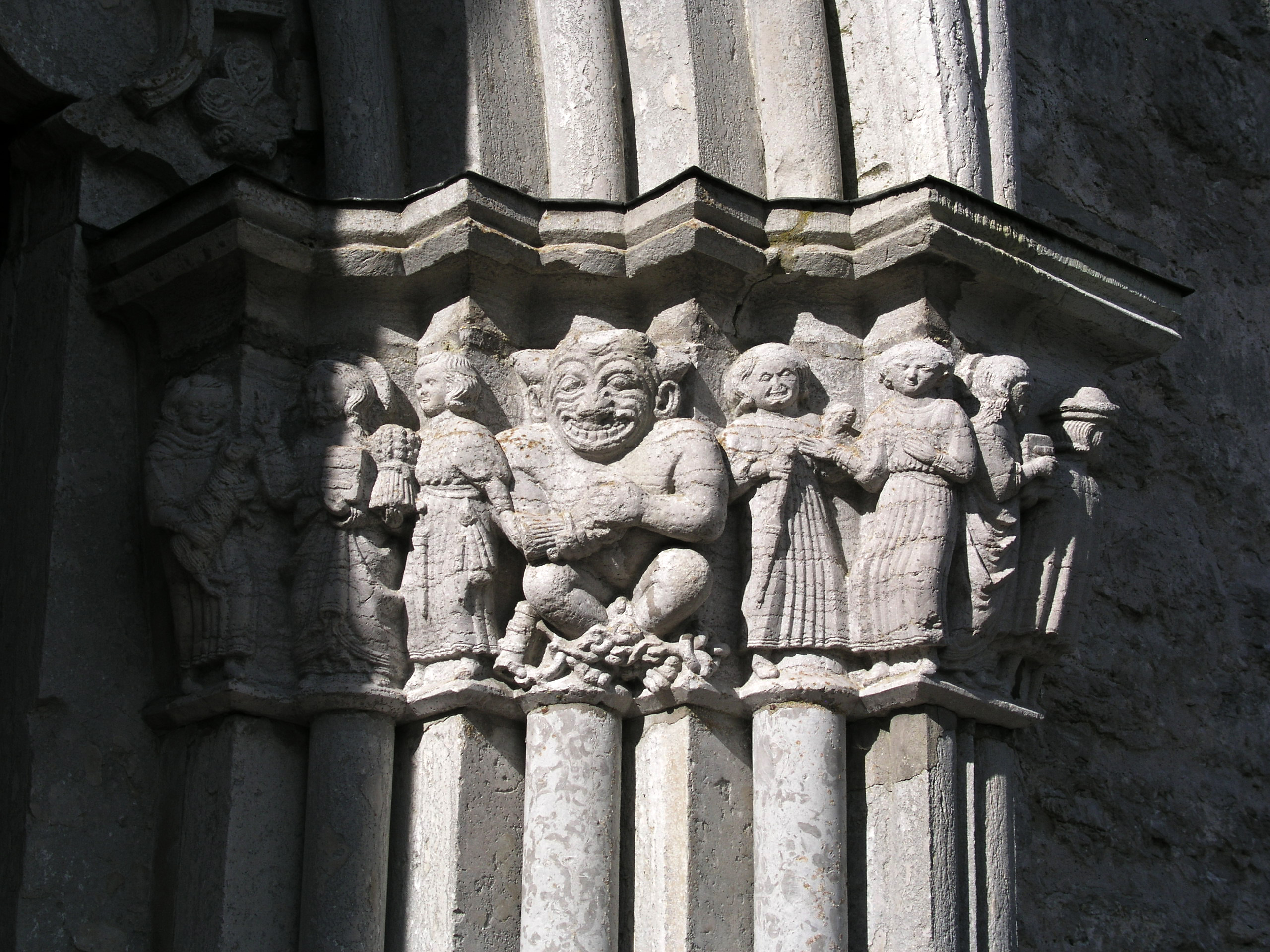 Gammelgarns kyrka, Diocese of Visby, Gotland, Sweden.